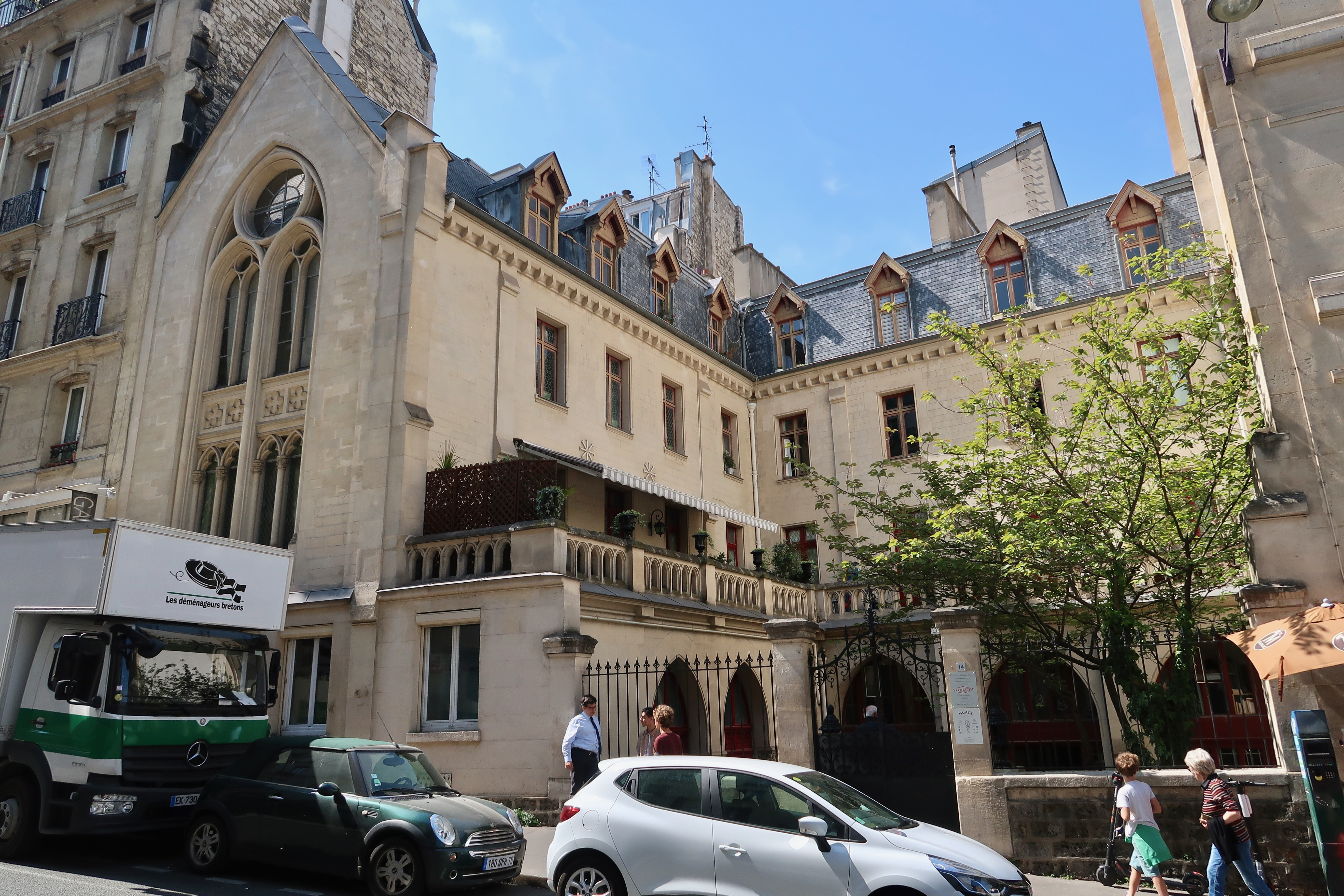 Chapelle de l'ancien collège de Presles, 14 rue des Carmes (Paris, 5e).